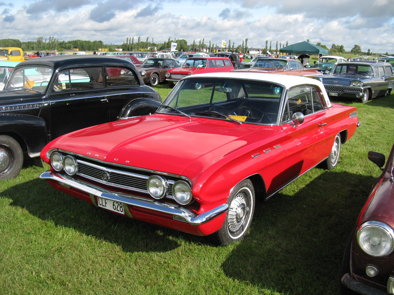 Buick Skylark 1962